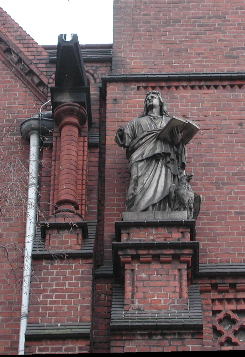 Skulptur am Turm der Immanuelkirche